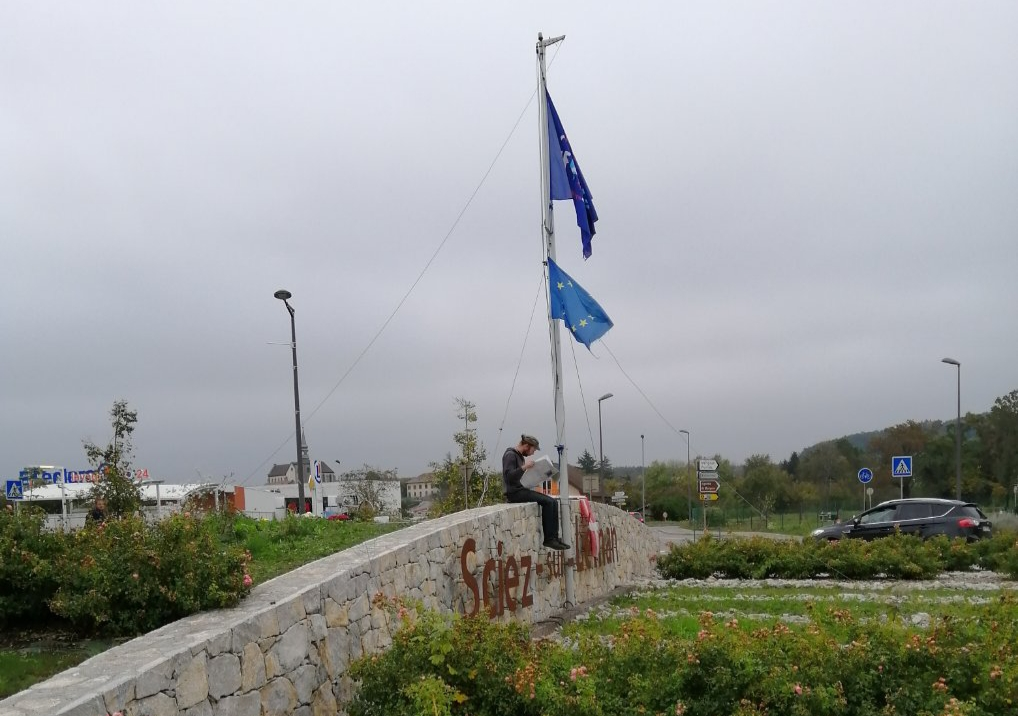 Rond-point de Sciez-sur-Léman.